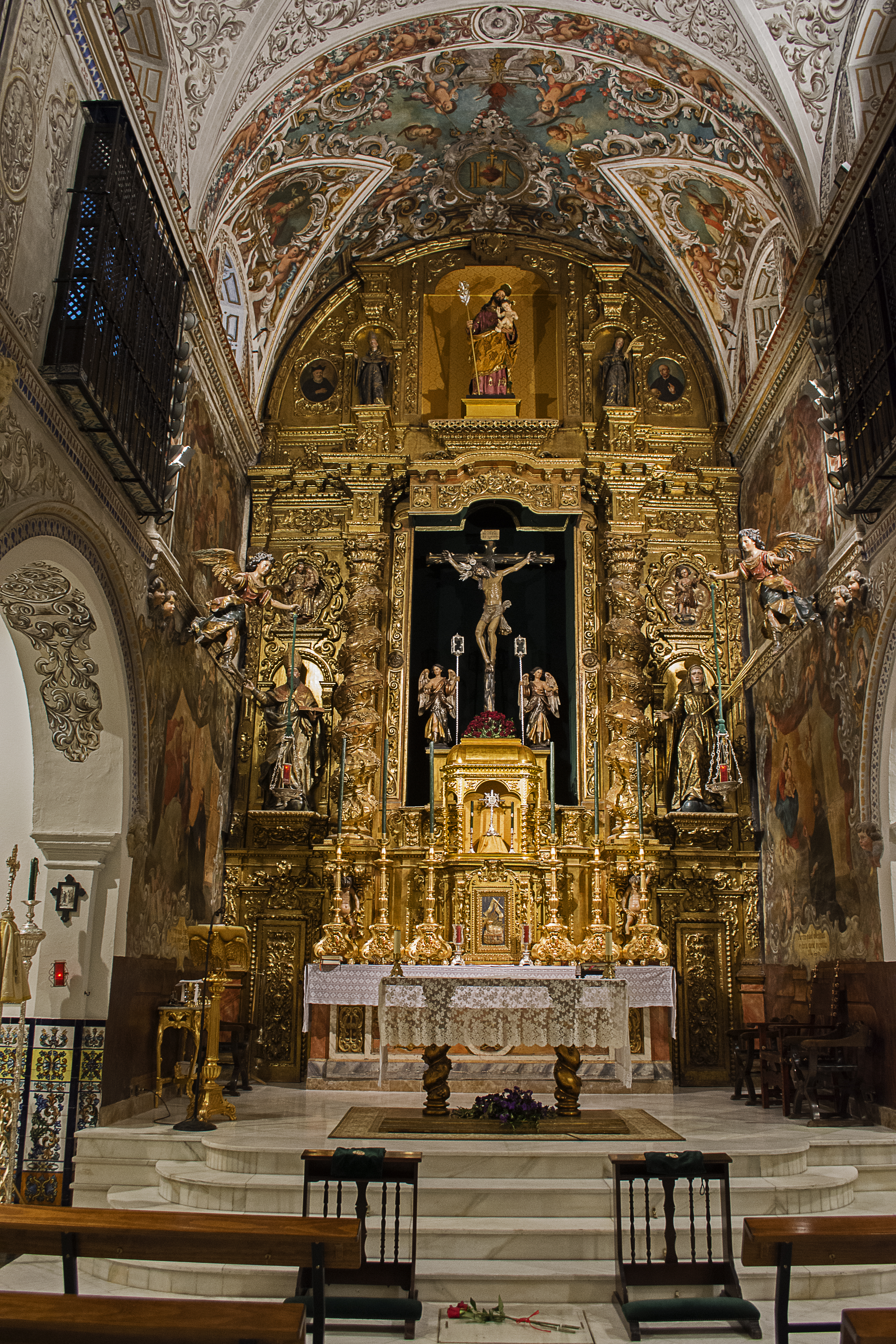 Capilla del Dulce Nombre de Jesús. Sevilla